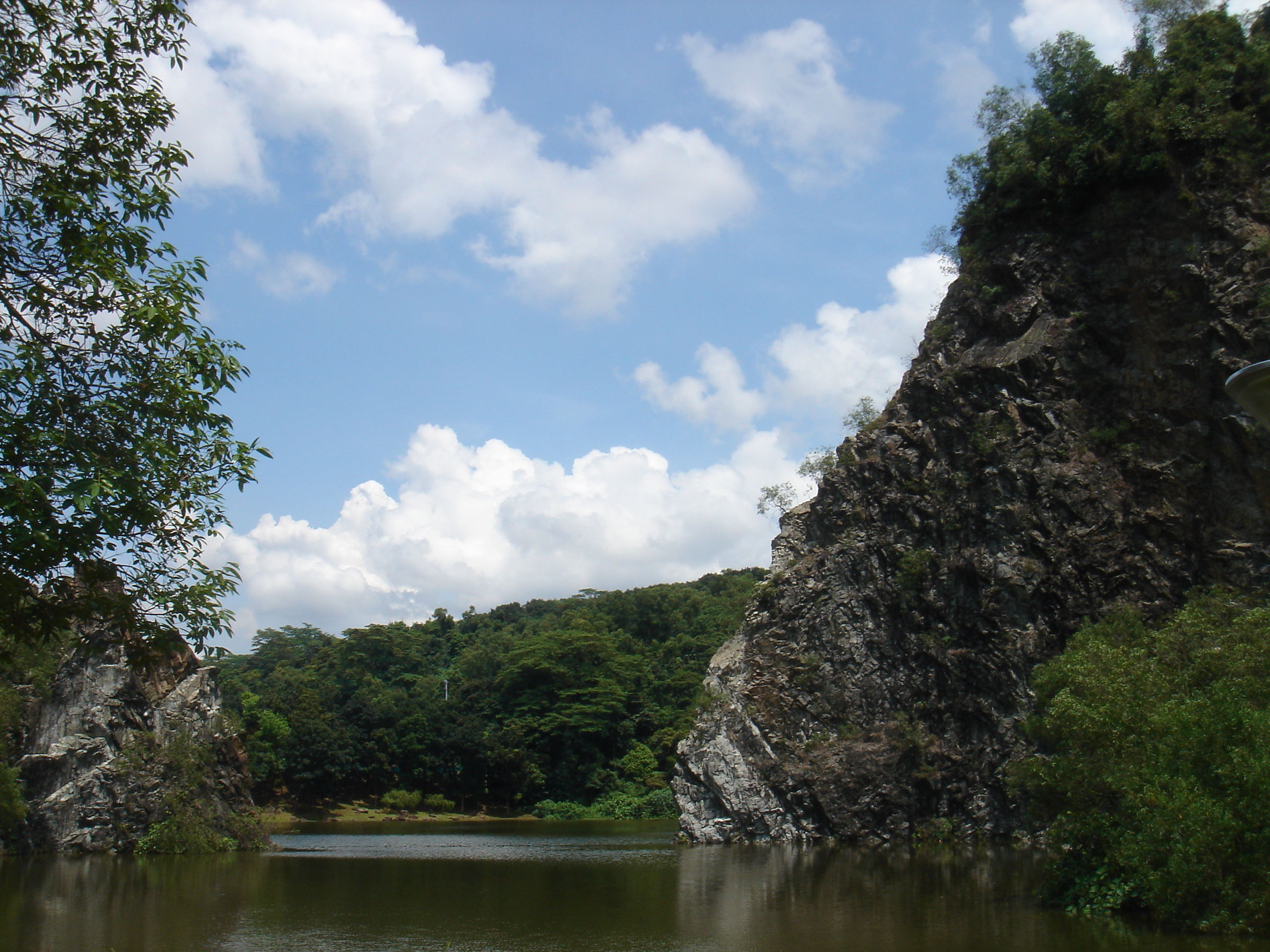 Little Guilin, Bukit Gombak, Singapore.